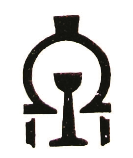 中文（中国大陆）: 1946年3月1日，全国铁路实行干线区管理制，设立了包括京（南京）沪（上海）区在内的铁路管理区和相应的管理局，以管理本区干线及其支线。京沪区路徽整体好似一个“京”字和一个机车图形，并由简约的线条构成机车锅炉、钢轨、车轮的图案。